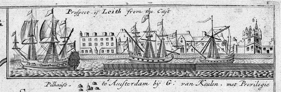 View of Leith (now a part of Edinburgh), Scotland, from: Gerard Hust van Keulen: De nieuwe grote lichtende Zee-Fakkel, het erste deel. Vergadert door Wylen Claas Jansz. Voogt, Amsterdam, 1788.